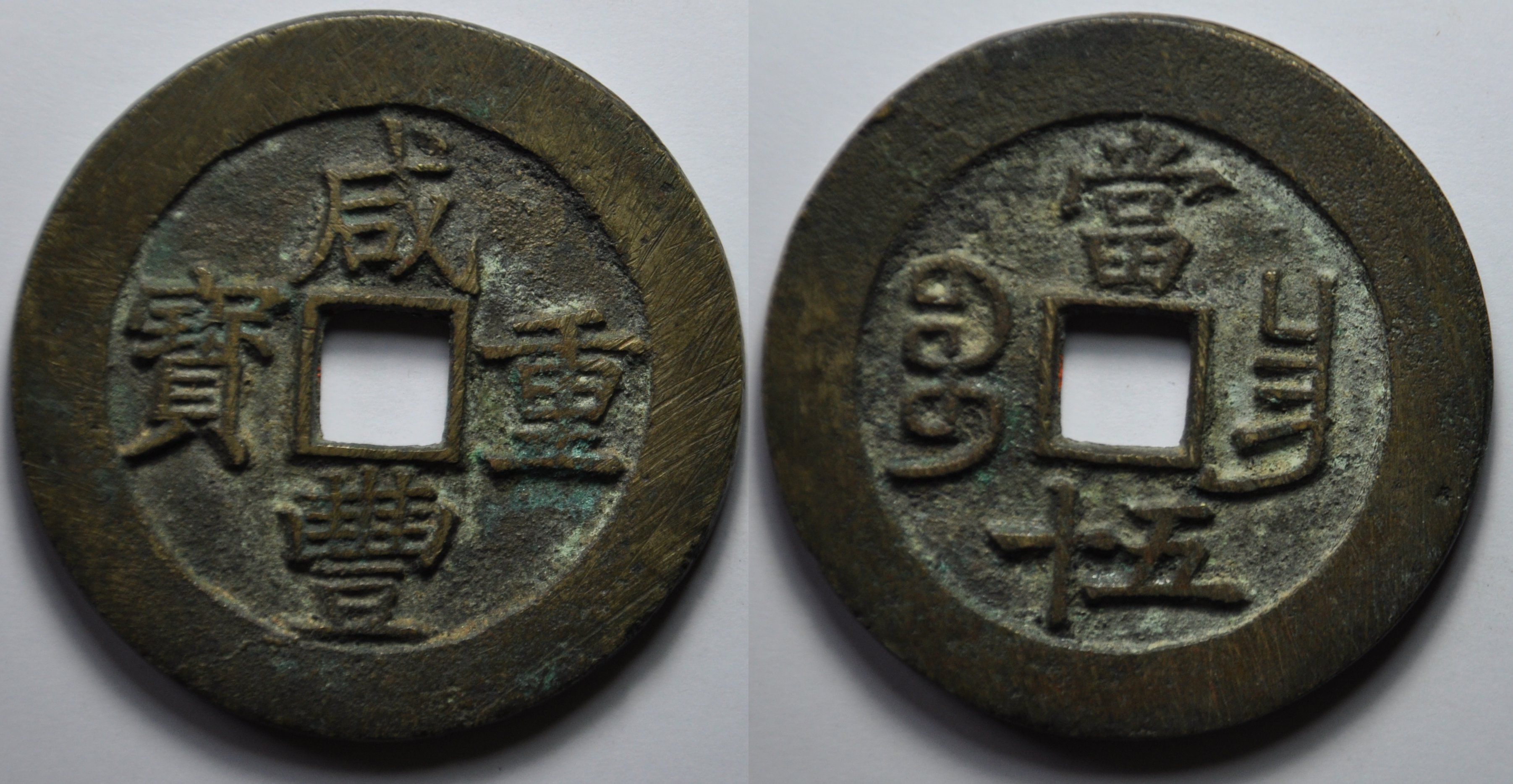 Une monnaie de 50 cash de l'empereur Wen Zong (1851-61), dynastie Qing (1644-1912) de l'atelier de Nanchang au Jiangxi. A/ Xian Feng zhong bao (Monnaie lourde de Xian Feng) R/ Bao chang, Dang wushi (valeur 50) Laiton Poids 46.5 g. Diamètre 52.5 mm Référence H22.931 émise entre 1855 et 1860.